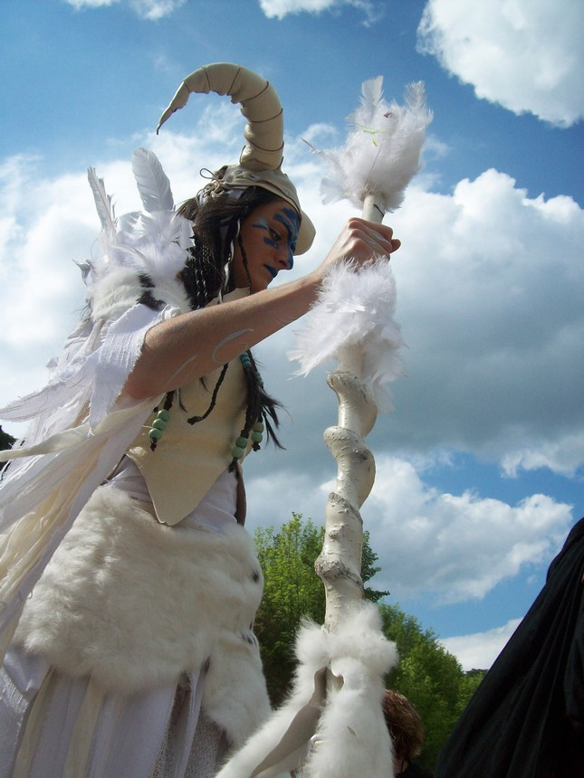 Château-fort, Festival médiéval 2011, Promenoir des Prêtres, ville de Sedan, Labellisée Ville d'Art et d'Histoire, département des Ardennes, région de Champagne-Ardennes